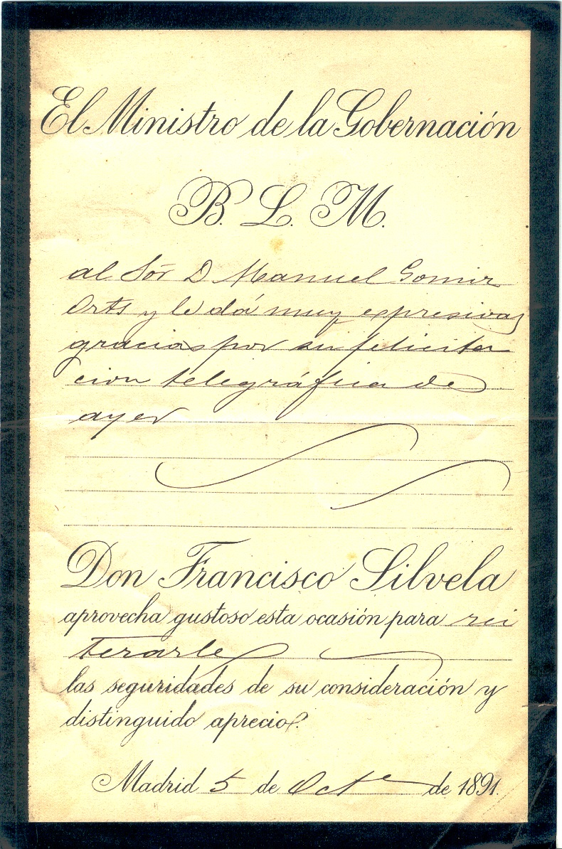 Agradecimiento del ministro Silvela al alcalde de Alicante M. Gomiz